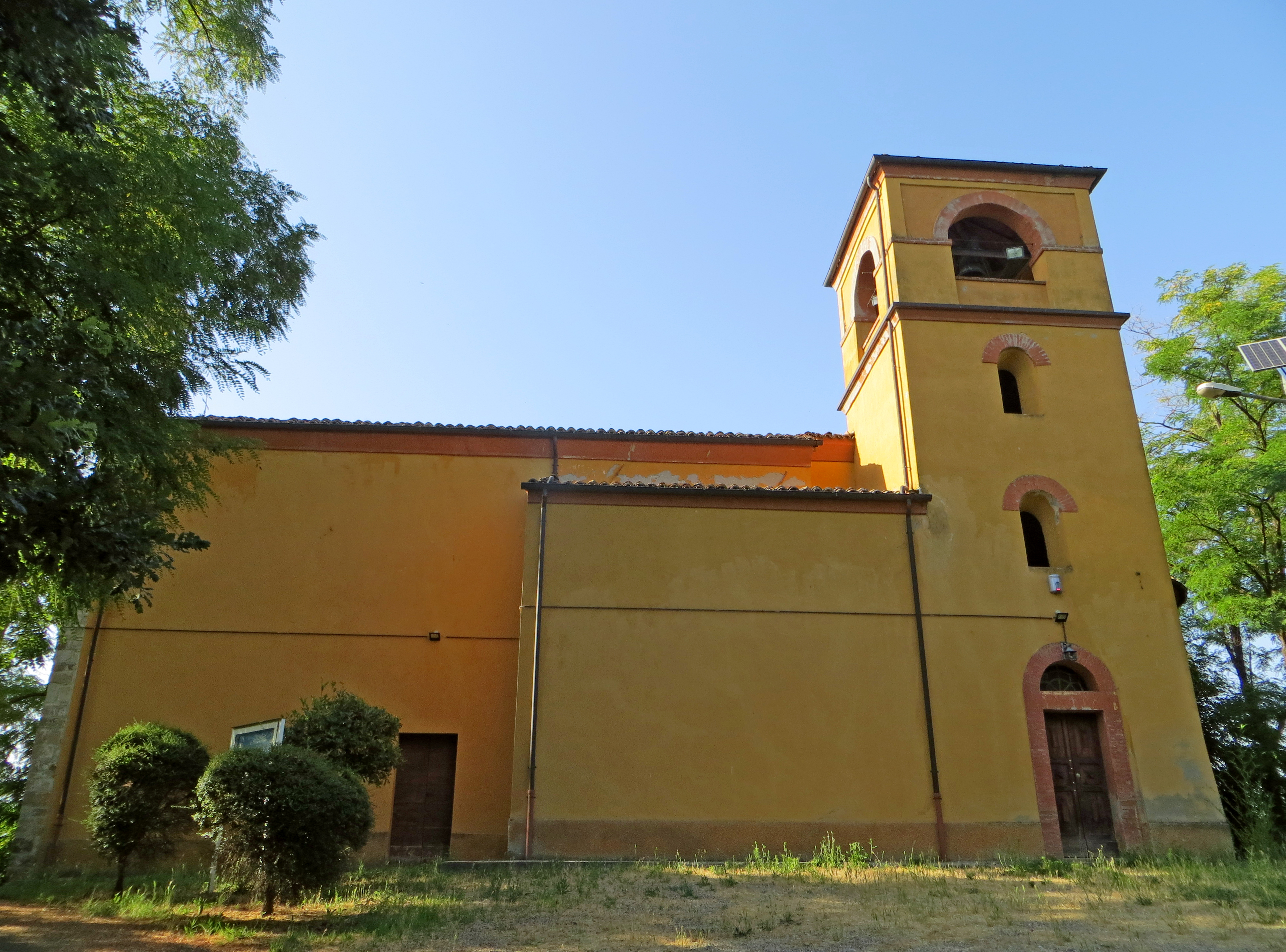 Chiesa dell'Assunzione di Maria Vergine (Vignale, Traversetolo) - lato sud